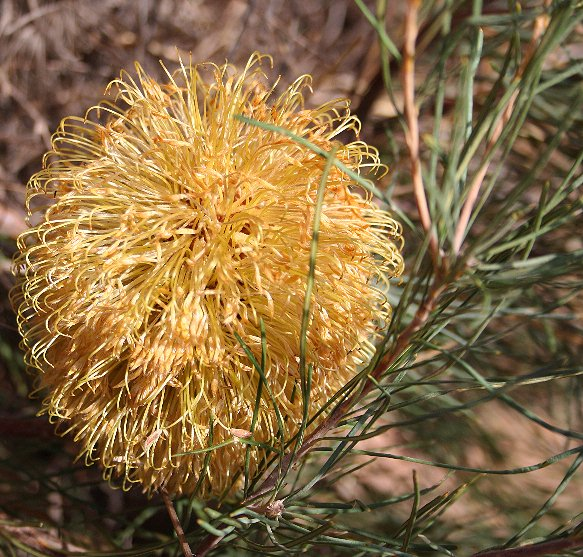 Banksia leptophylla var. leptophylla, Burma Rd